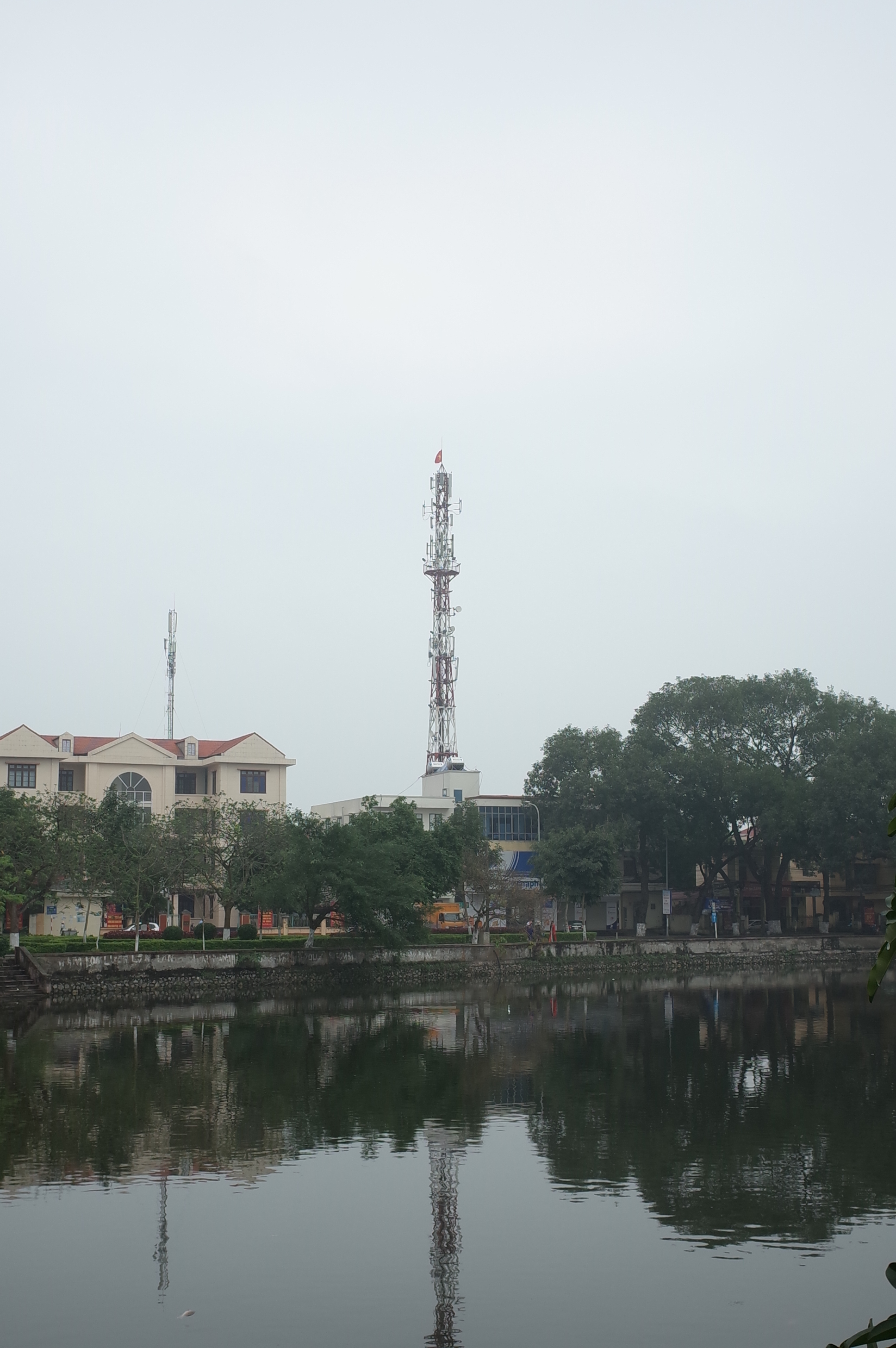 Tháp thu phát sóng thị trấn Thứa, huyện Lương Tài, tỉnh Bắc Ninh. Ảnh chụp từ phía bên kia hồ Thứa.